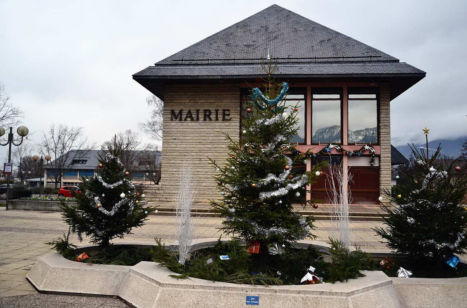 la mairie